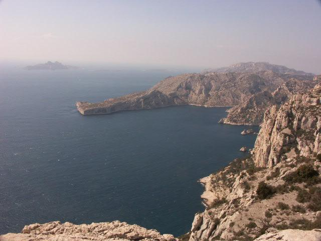 Photo Jaypee Calanque de MORGIOU et Sugiton